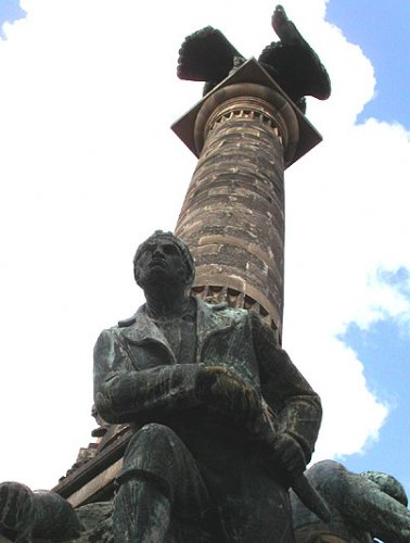 Pormenor do monumento aos Heróis da Guerra Peninsular, na Praça Mouzinho de Albuquerque (Rotunda da Boavista) no Porto.